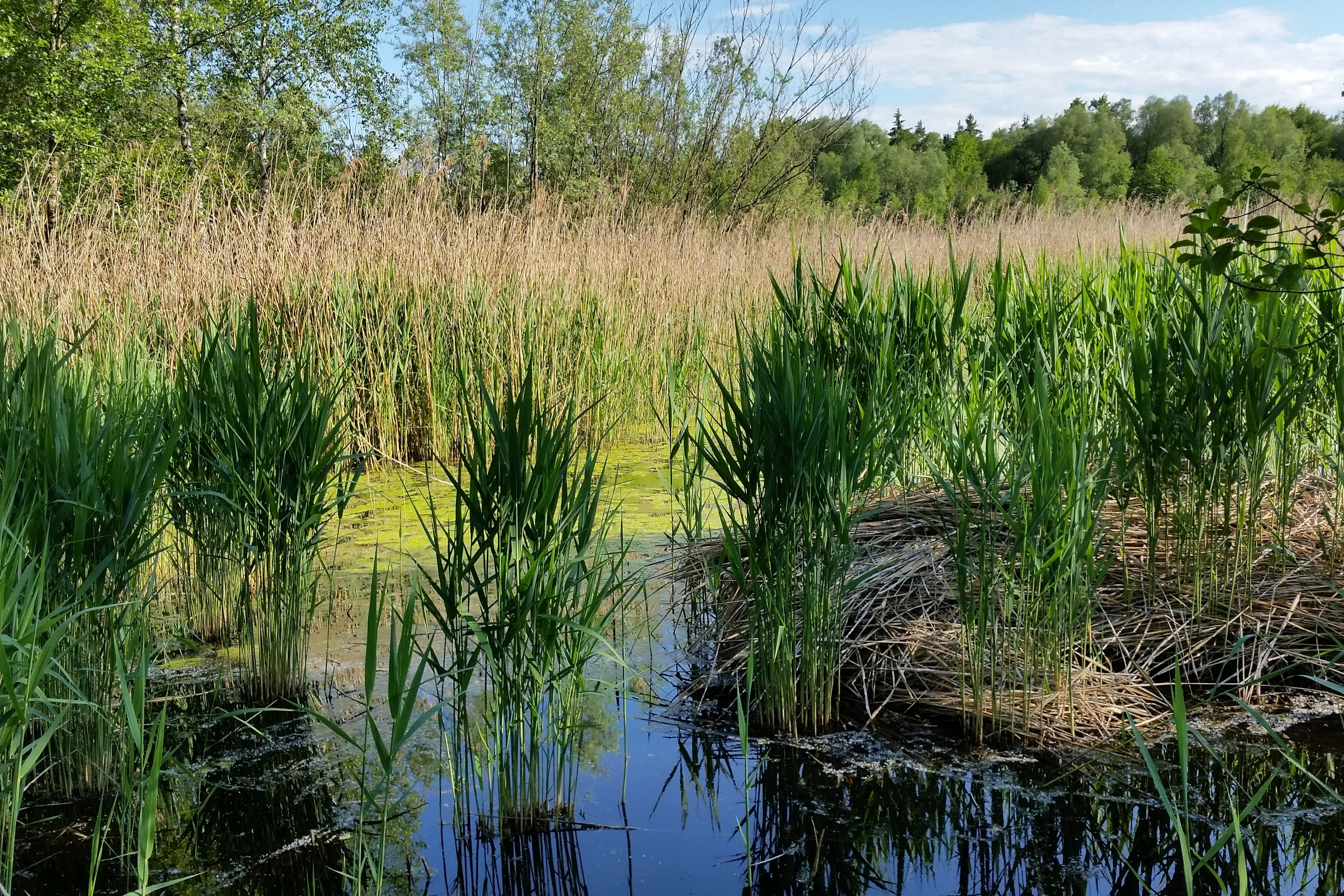 Bürmooser Moor This media shows the nature reserve in Salzburg with the ID NSG00028.